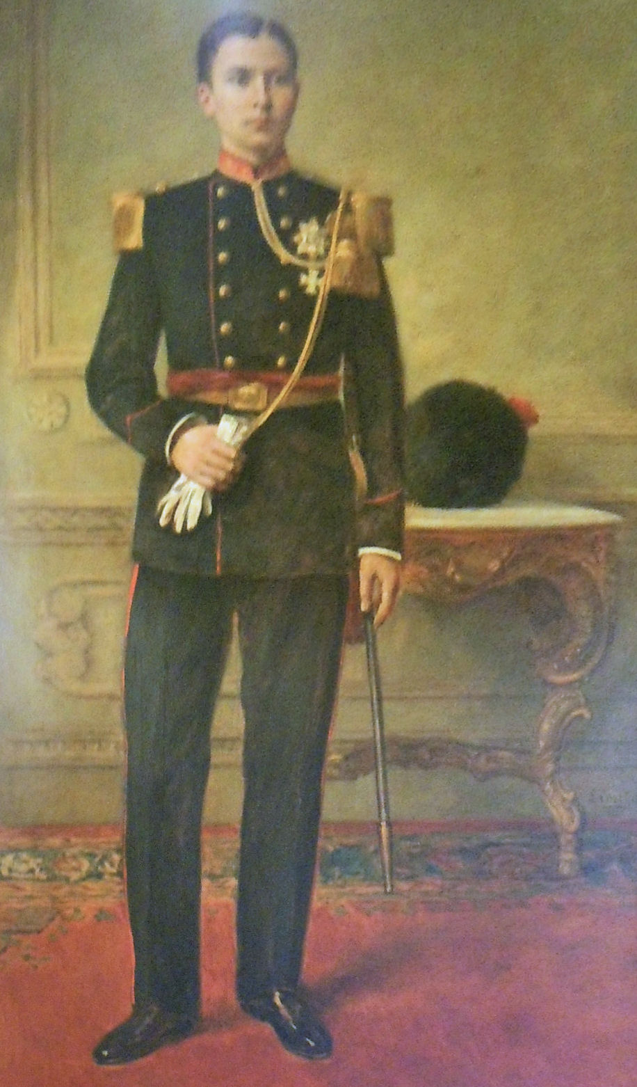 Prince Boudewijn, Collection Grenadiers